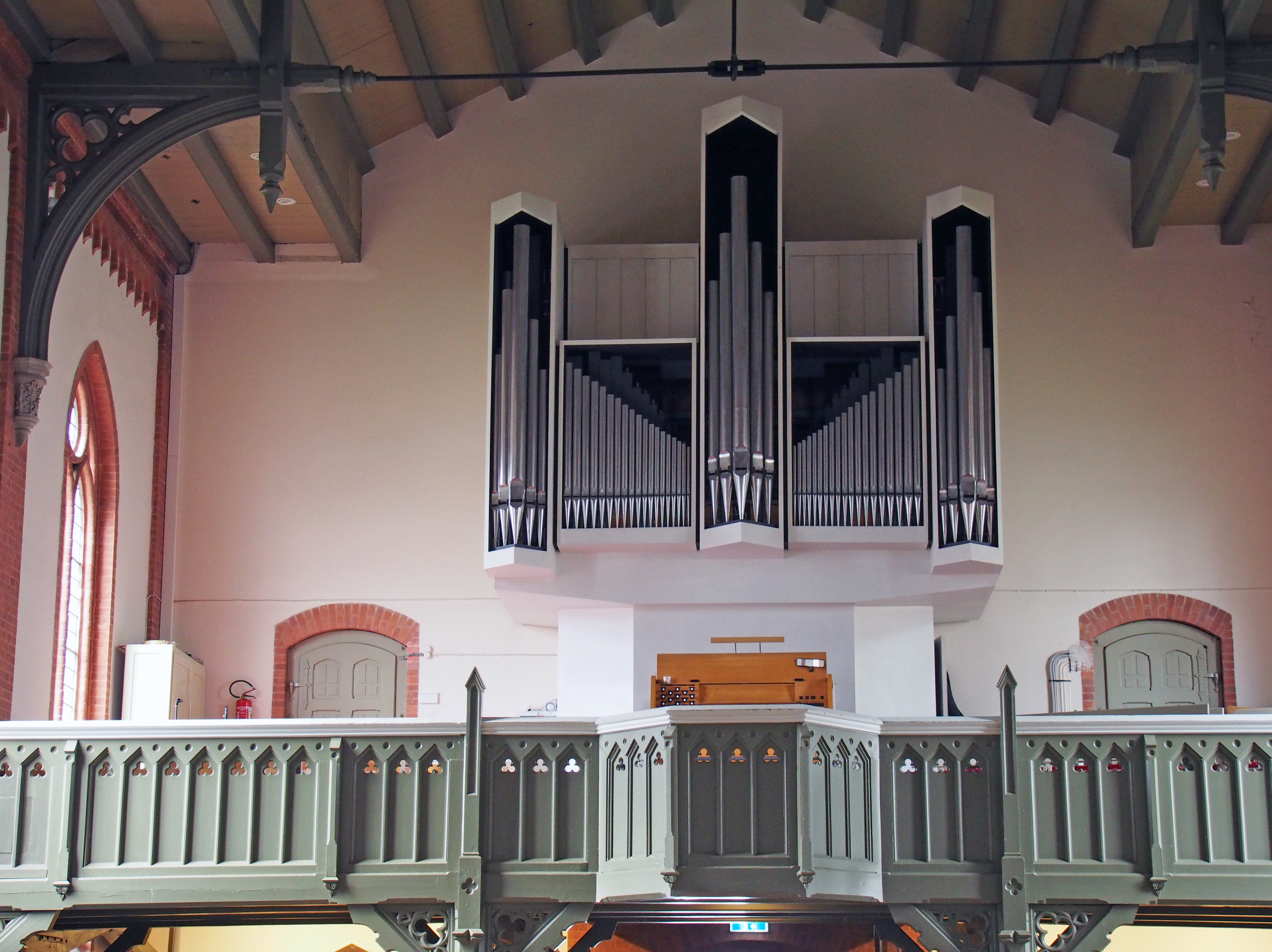 Orgelempore der Warnemünder Kirche